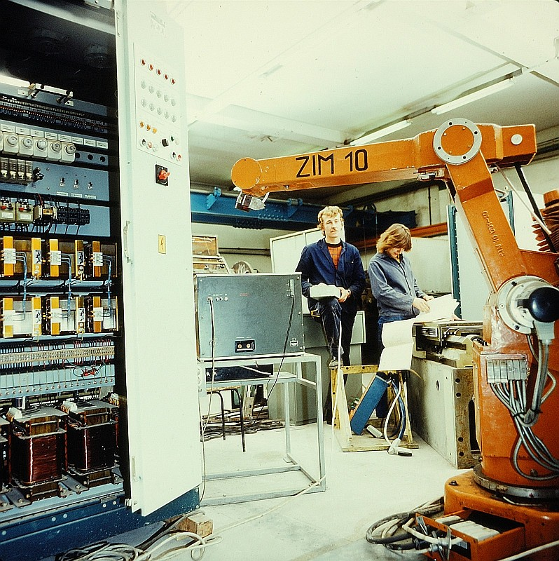 Original image description from the Deutsche FotothekFacharbeiter für BMSR-Technik